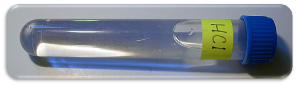 Kyselina chlorovodíková - HCl